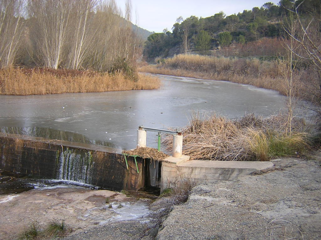 La Resclosa del Pla de Cardona, un gèlid dia d'hivern (Monistrol de Calders, Moianès)